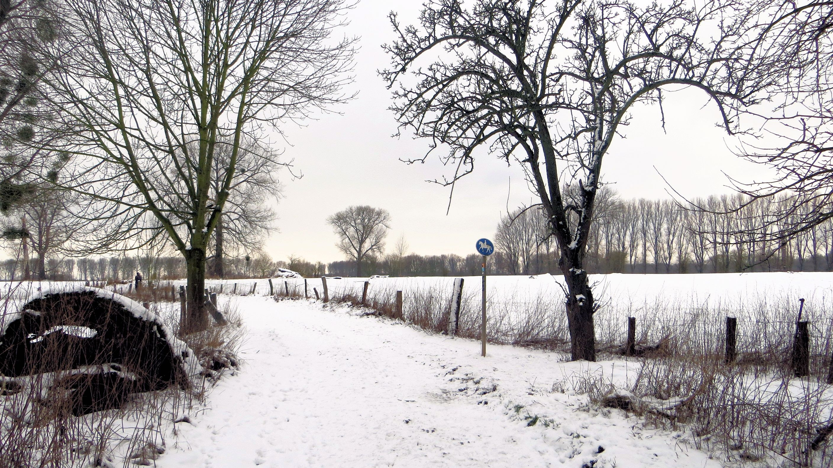 Naturschutzgebiet „Urdenbacher Kämpen“, Ortweg in der Urdenbacher Kämpe im Winter, Düsseldorf-Urdenbach